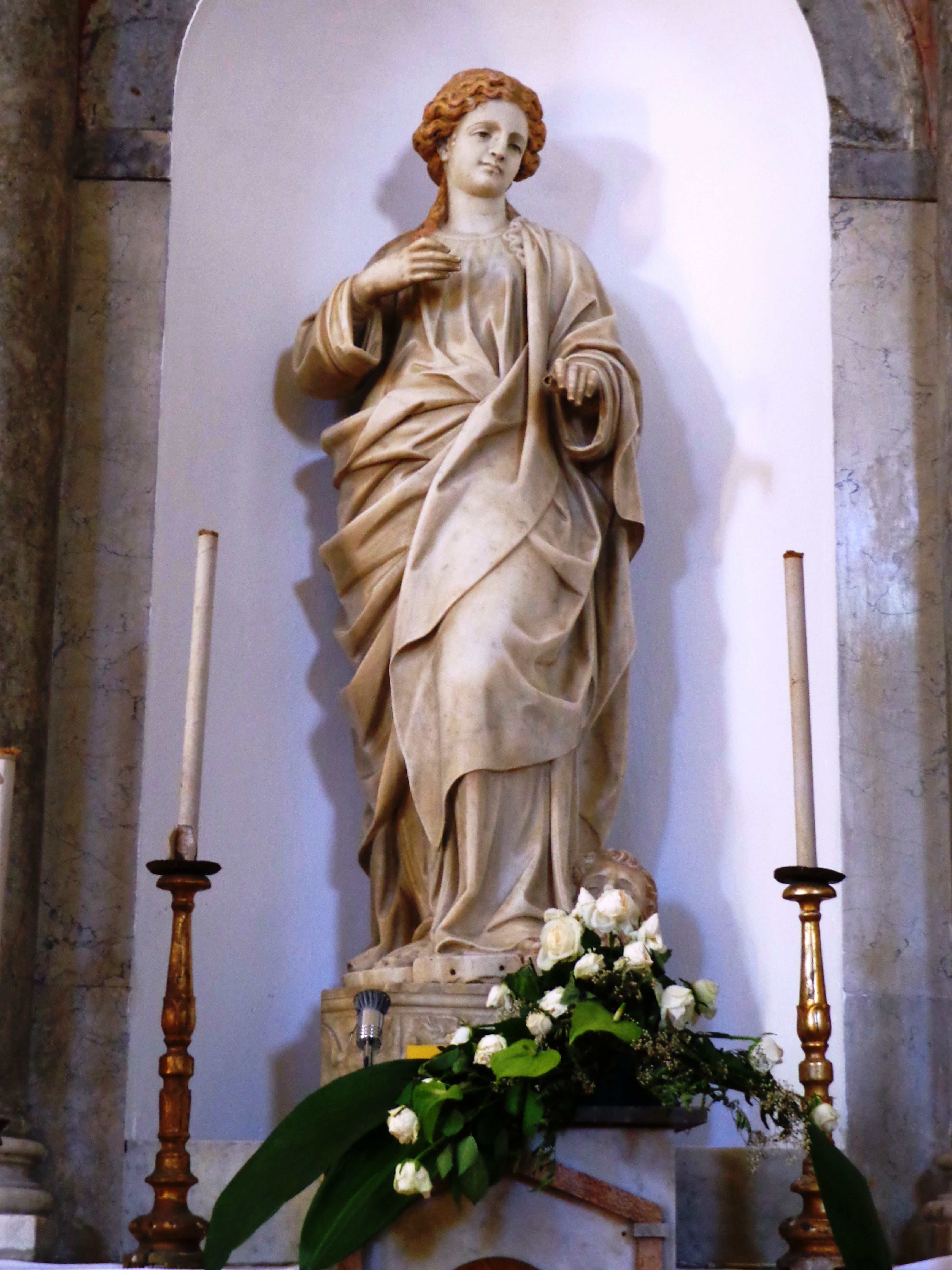 Barcellona P. di G. Gagini 02